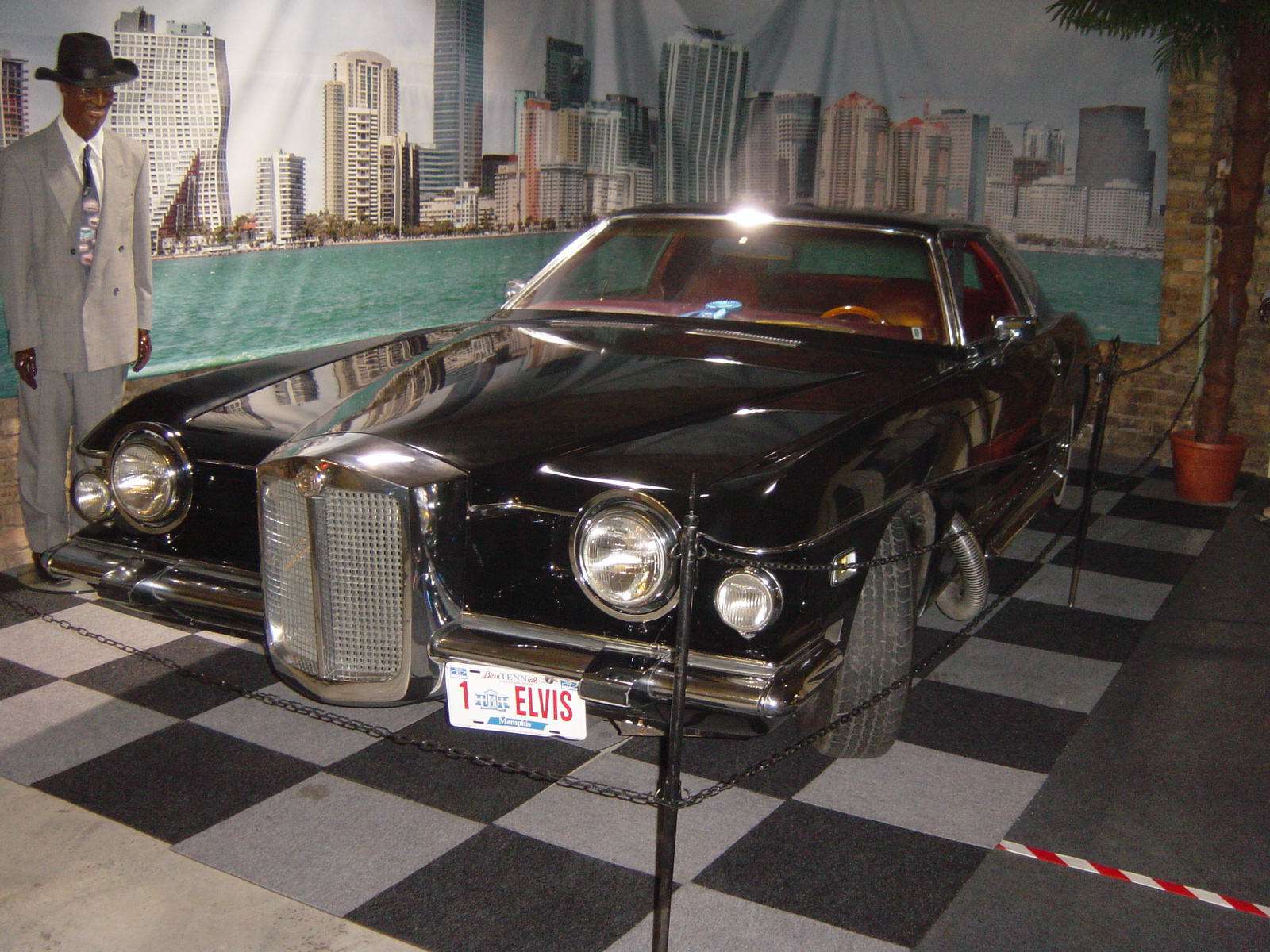 Álomautó múzeum